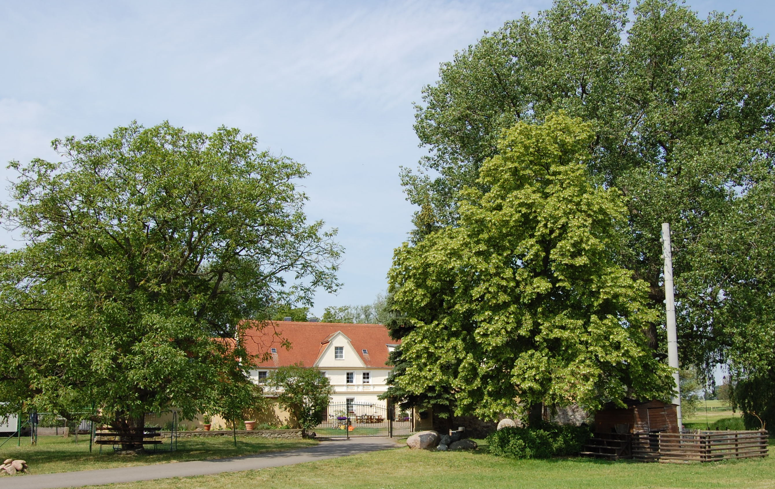 Vordermühle Elbeu Blick auf den Mühlenhof